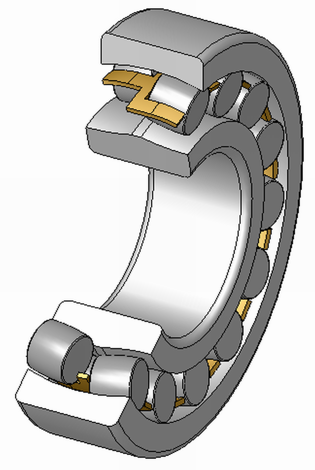 Pendelrollenlager, Blechkaefig aus Messing, 120°Schnitt, Hinweis: Innenaufbau des Lagers (insbesondere des Kaefigs) variiert je nach Hersteller und Baugroesse rolling contact bearings